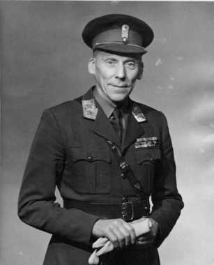 Generalløytnant Ole Berg (1890-1968) offiser, forsvarssjef